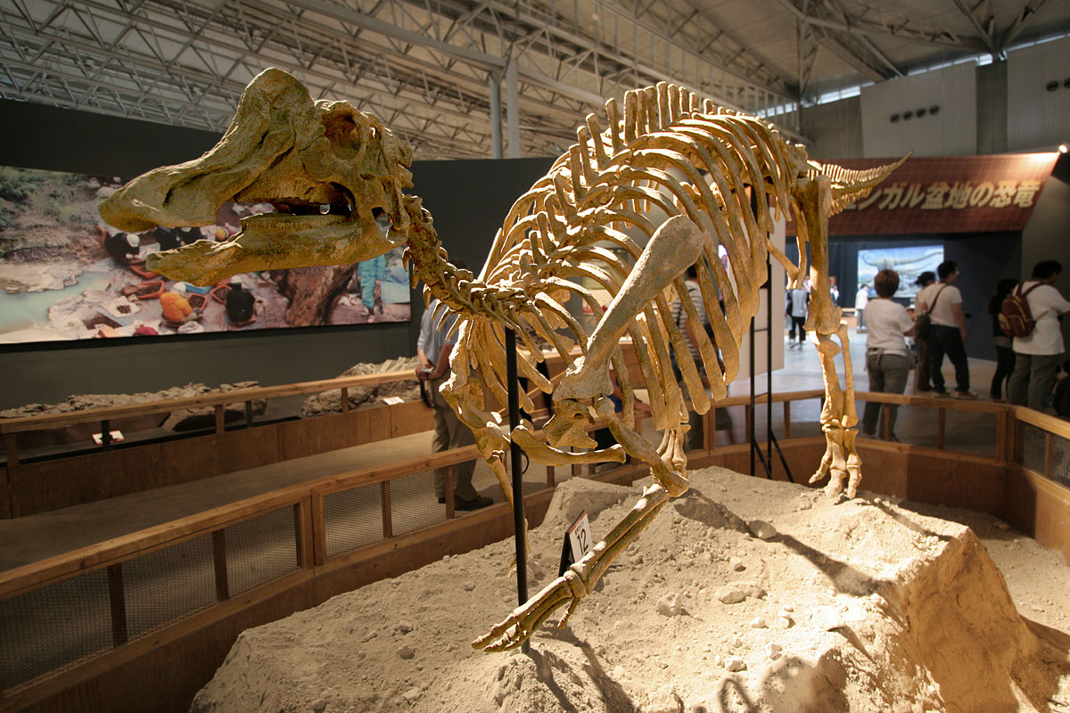 Nipponosaurus - 01